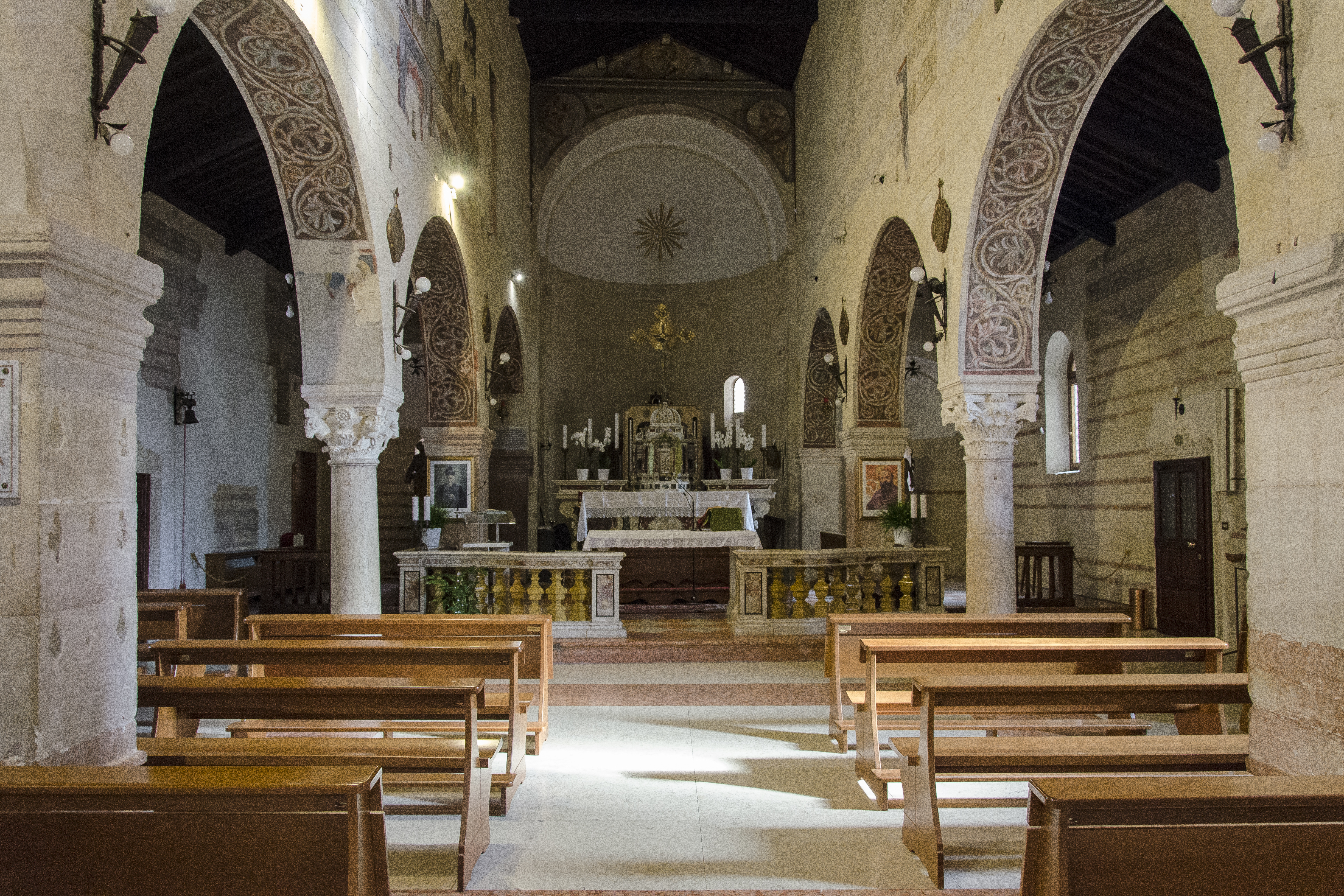 Aula della chiesa verso l'altare